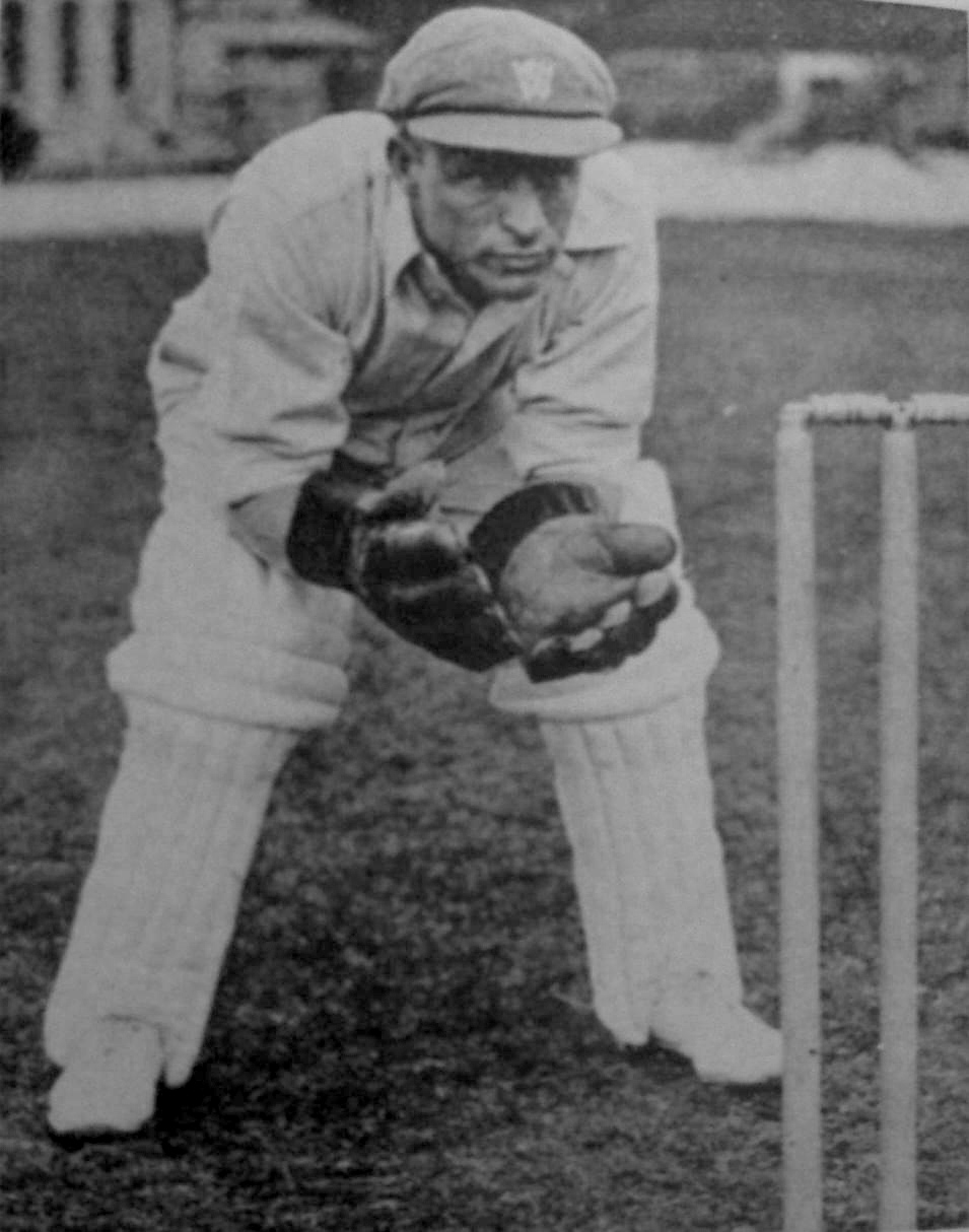 Bert Oldfield wicketkeeping